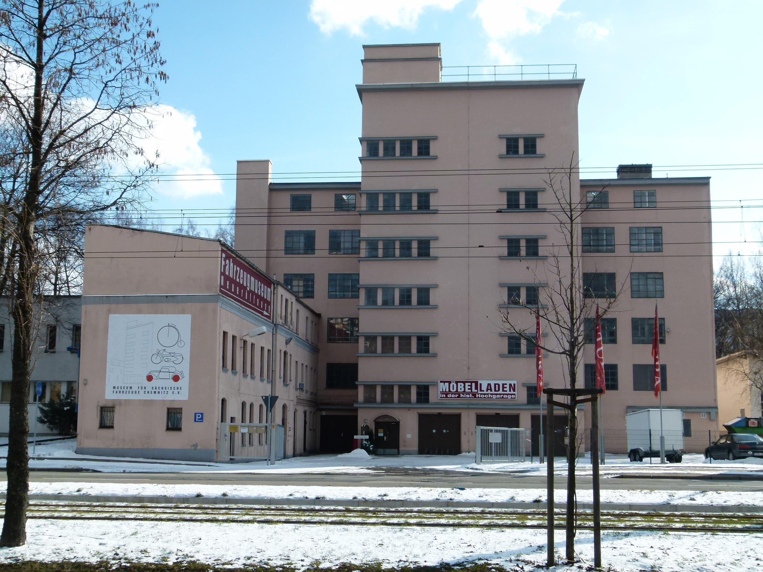 Denkmalgeschützter Garagenhof in Chemnitz, Zwickauer Straße 77, Fahrzeugmuseum